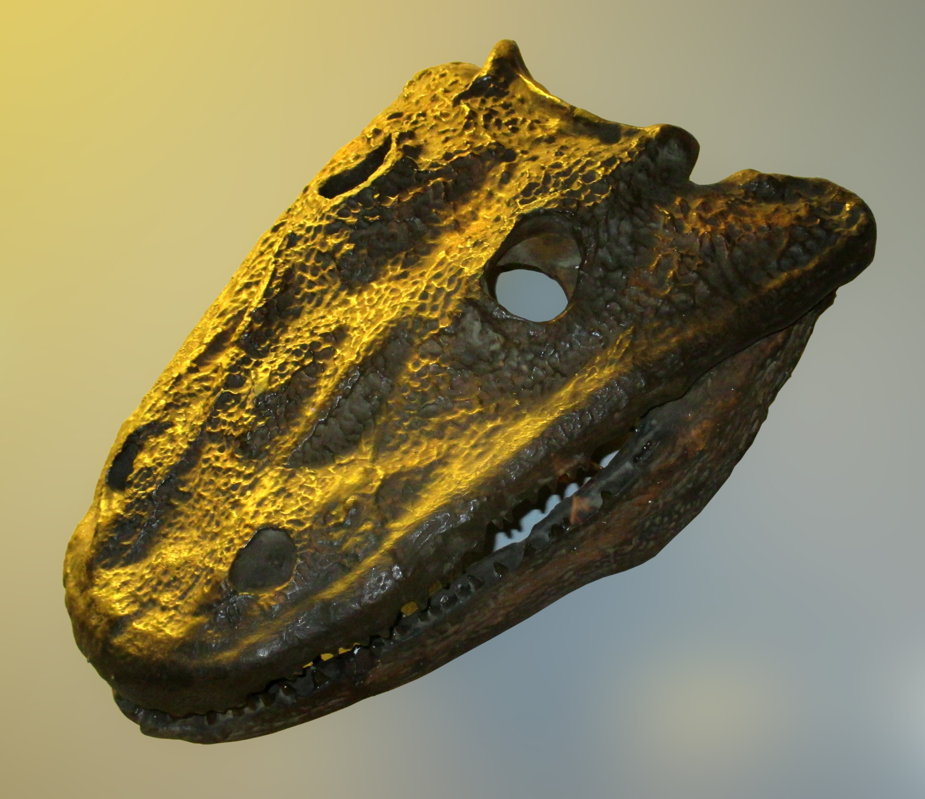 Avgjutning av fossilt huvud av jätteamfibien Eryops megacephalus på Göteborgs Naturhistoriska Museum, Göteborg, Västra Götalands län, Sverige.